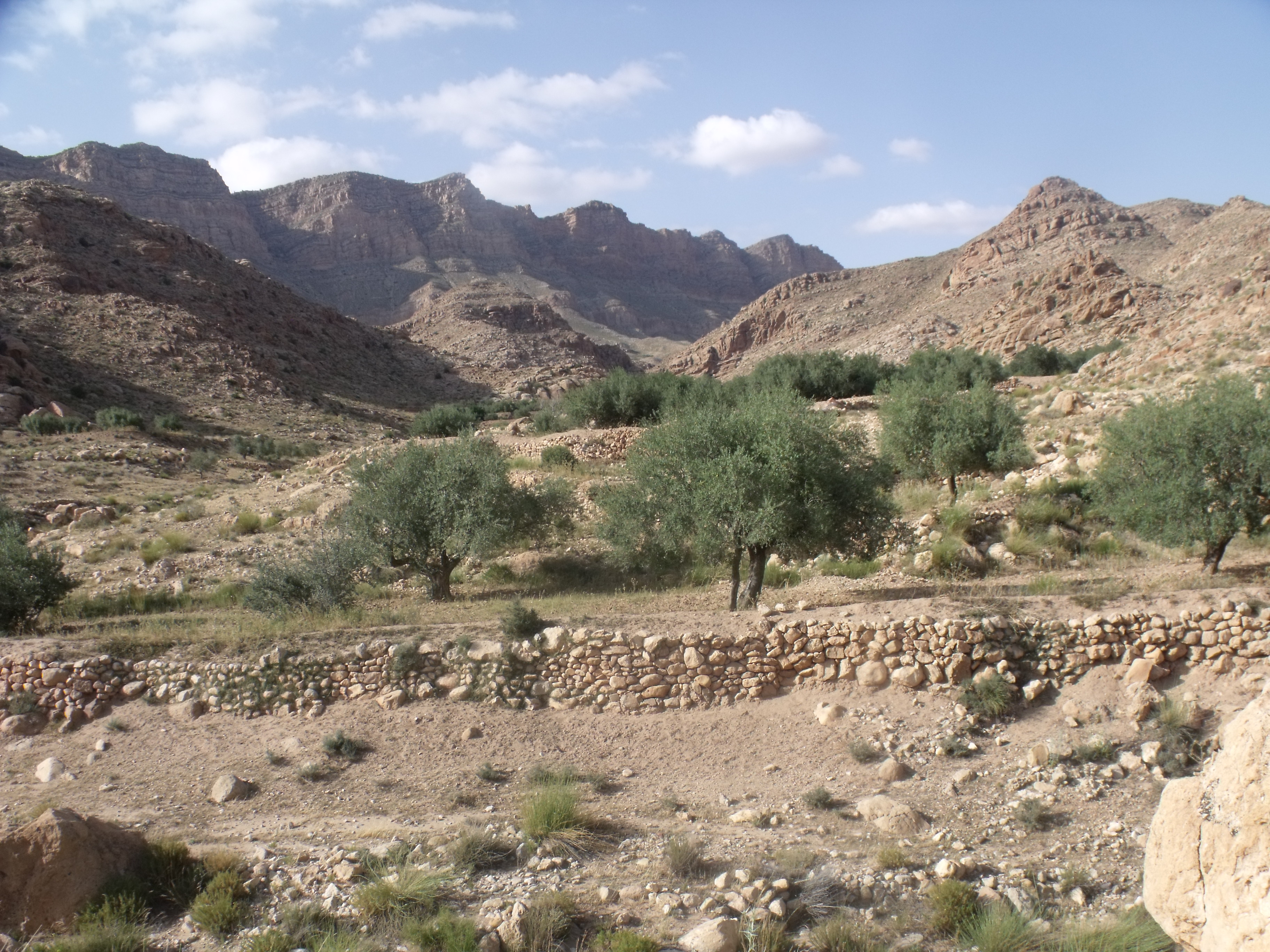 Photographie personnelle du Djebel Orbata à Bou Omran, Tunisie (Gafsa)